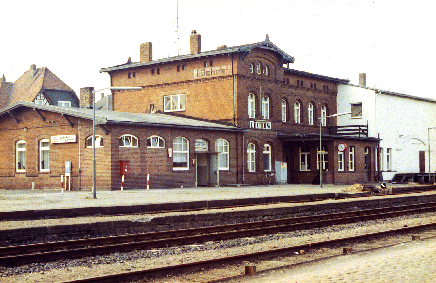 Im Vordergrund dritte Gleis entlang der Ladestraße. Der Bahnsteig befindet sich zwischen den ersten Gleis und zweiten Gleis im Bahnhof Lüchow.